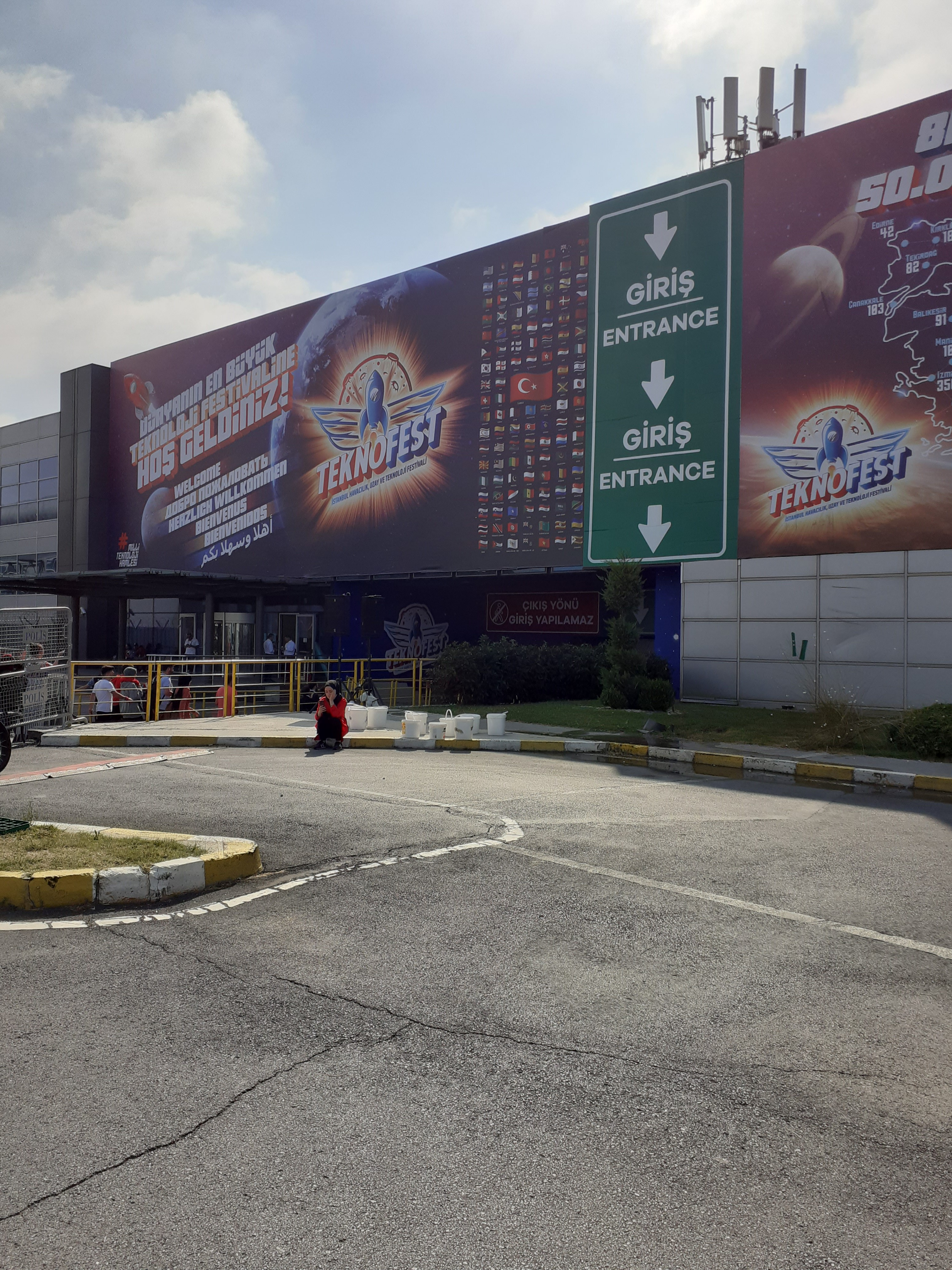 Teknofest 2019 girişi.